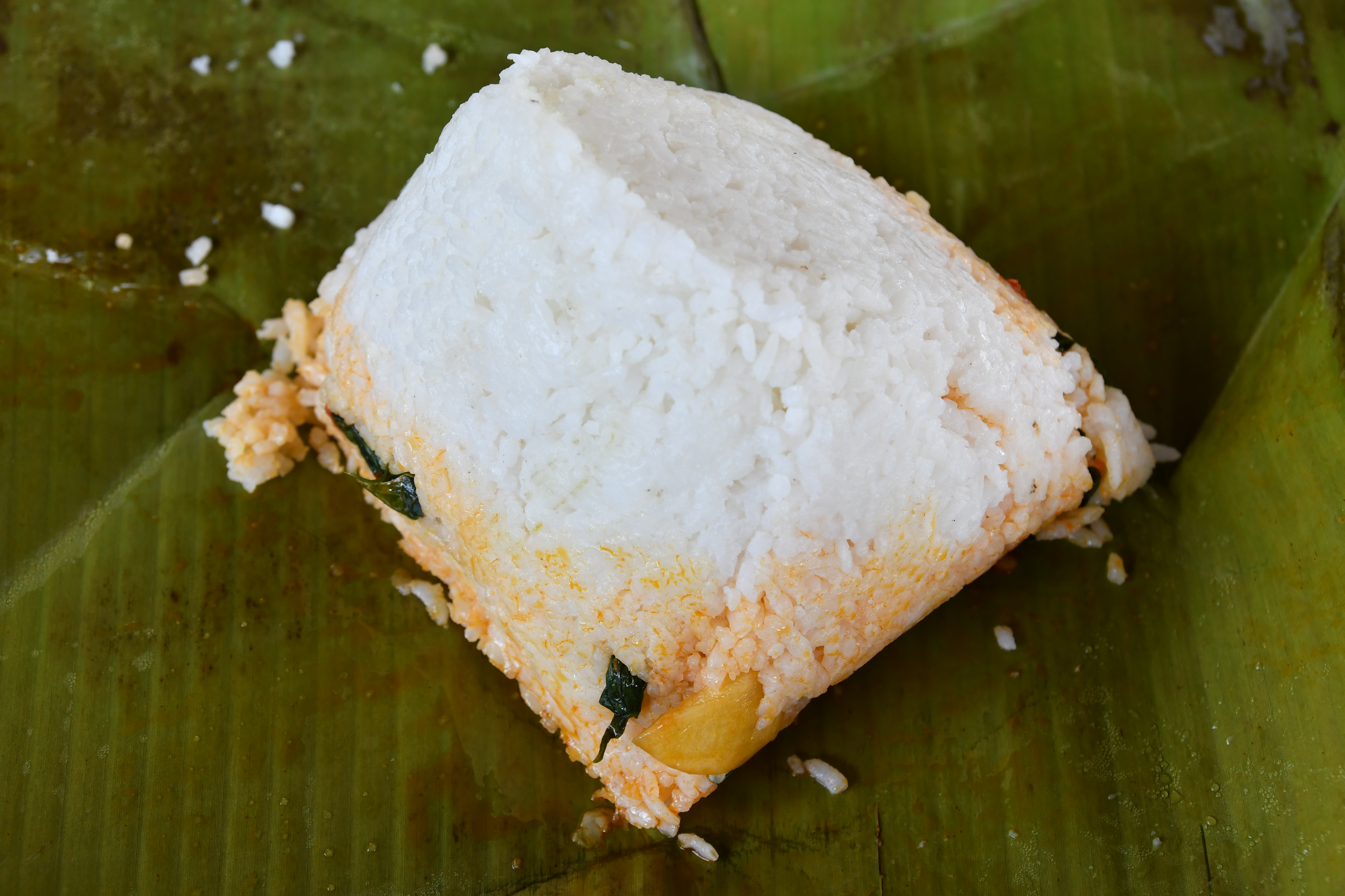 Masakan khas Kota Padang Panjang